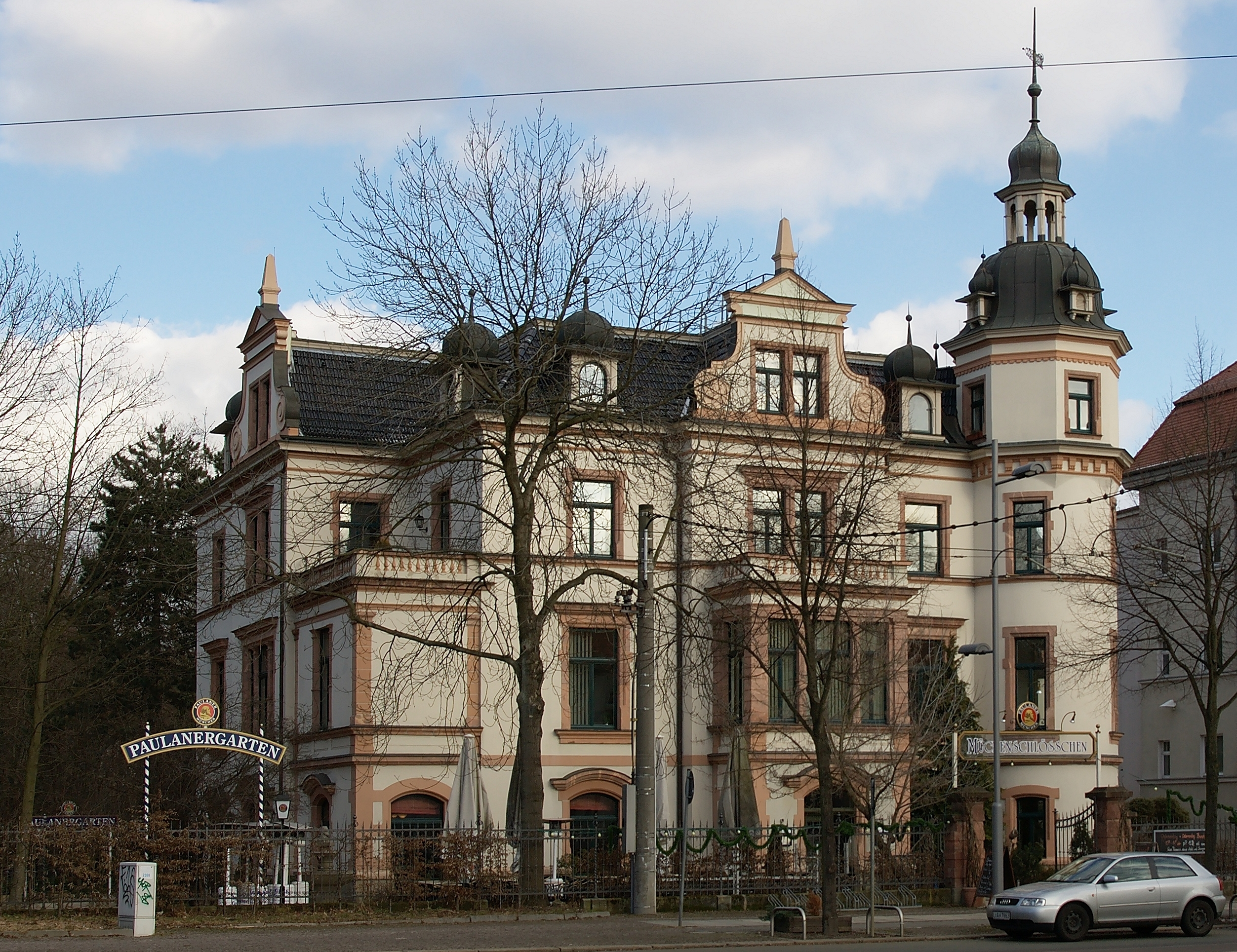 Das Mückenschlösschen im Waldstraßenviertel.